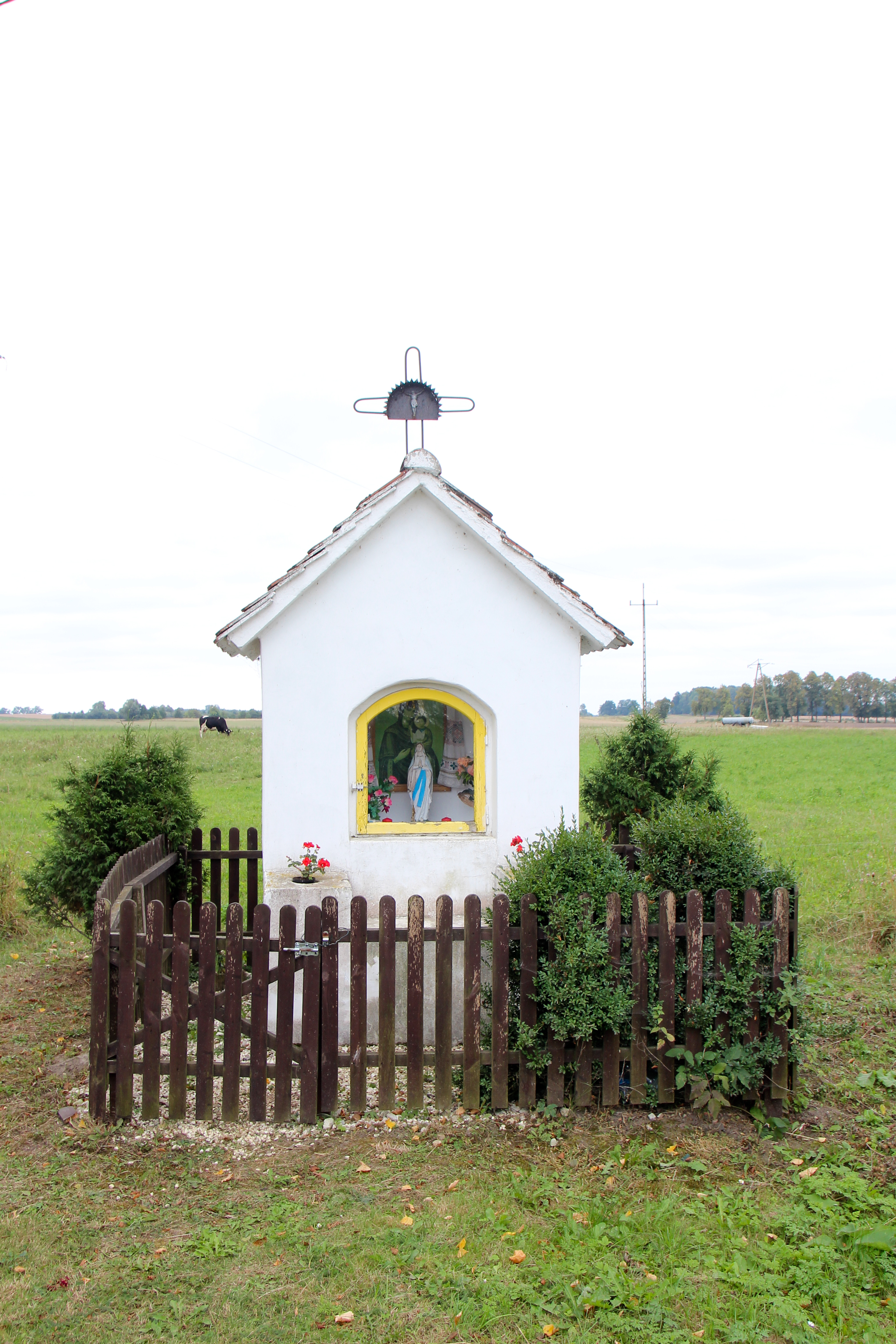 Duje - wieś w Polsce w województwie warmińsko-mazurskim, w powiecie kętrzyńskim, w gminie Barciany.